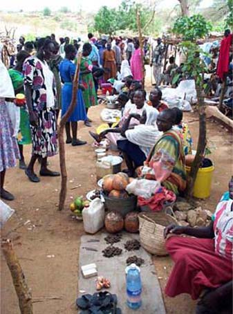 market, Nuba Mountains, Sudan